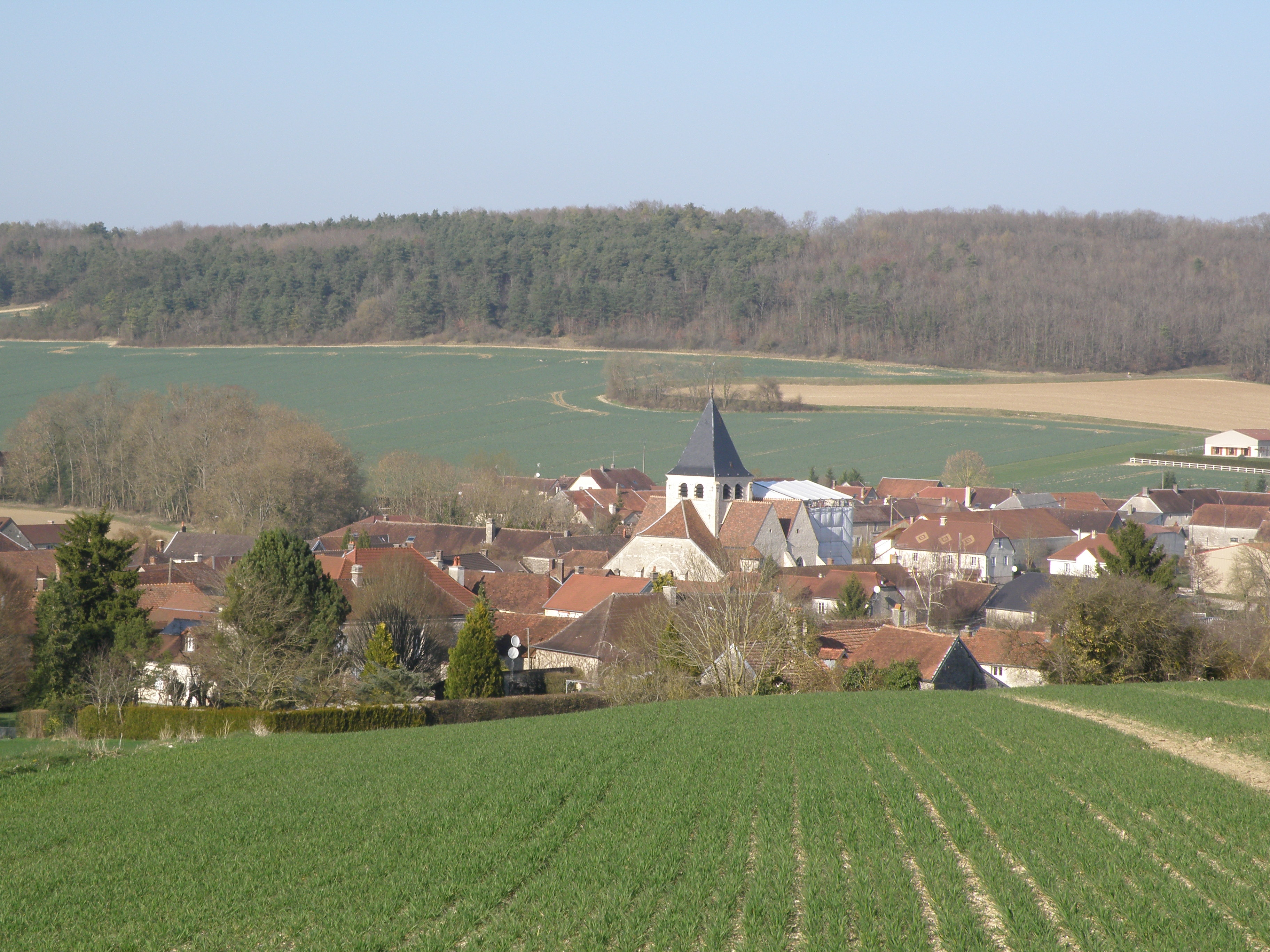 Avirey-Lingey 10340